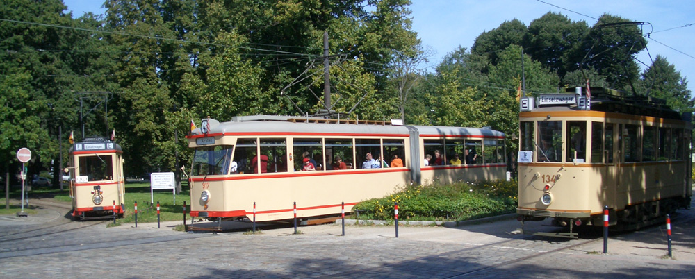 Historische Triebwagen 701, 917 und 134 der Bremer Straßenbahn AG an der Bürgerpark-Schleife